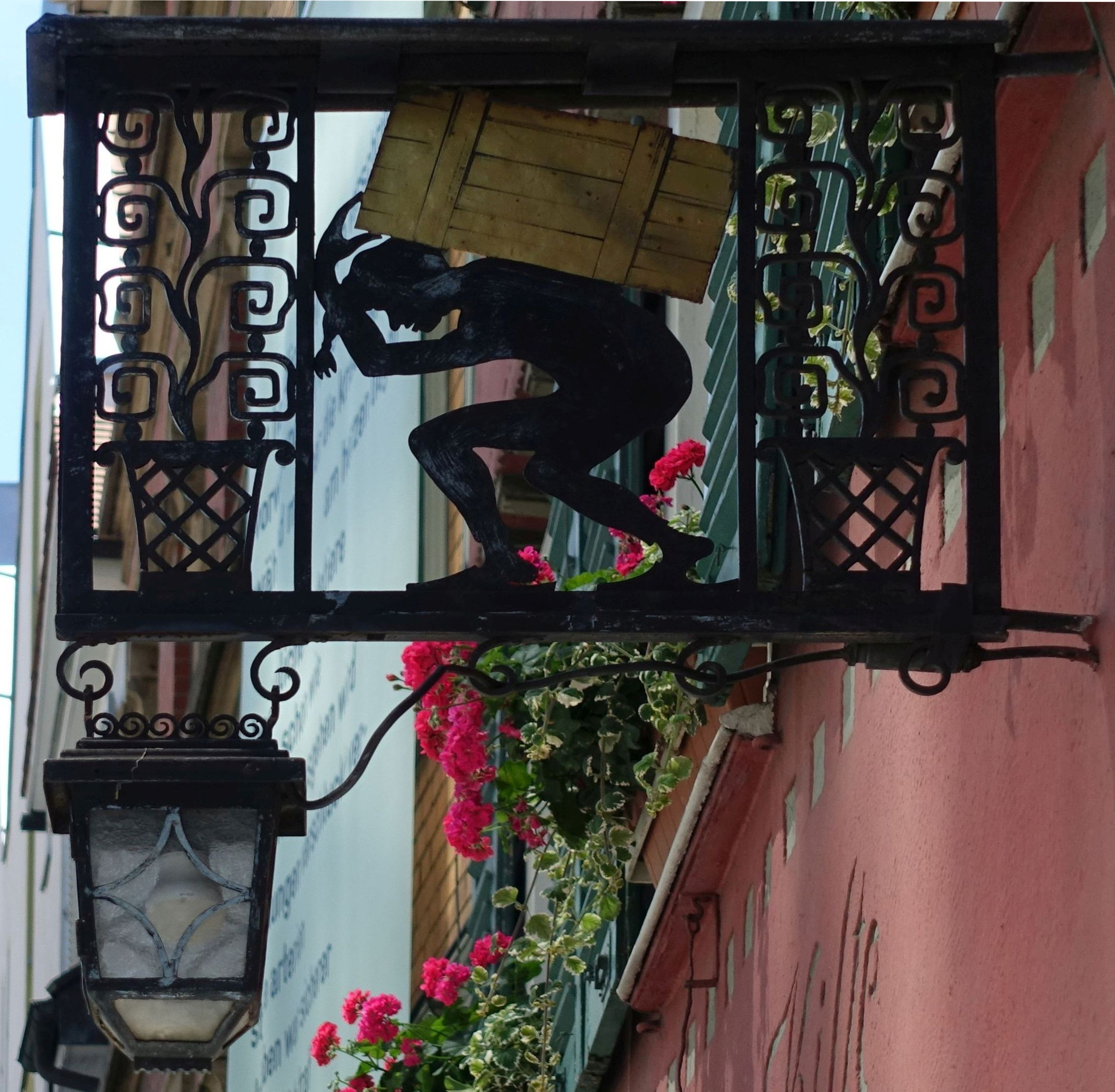 Wirtshausschild der Restauration zur Kiste in Stuttgart, Kanalstraße 2.